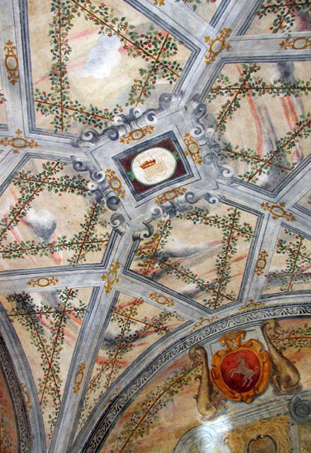 Castello di Peschiera Borromeo